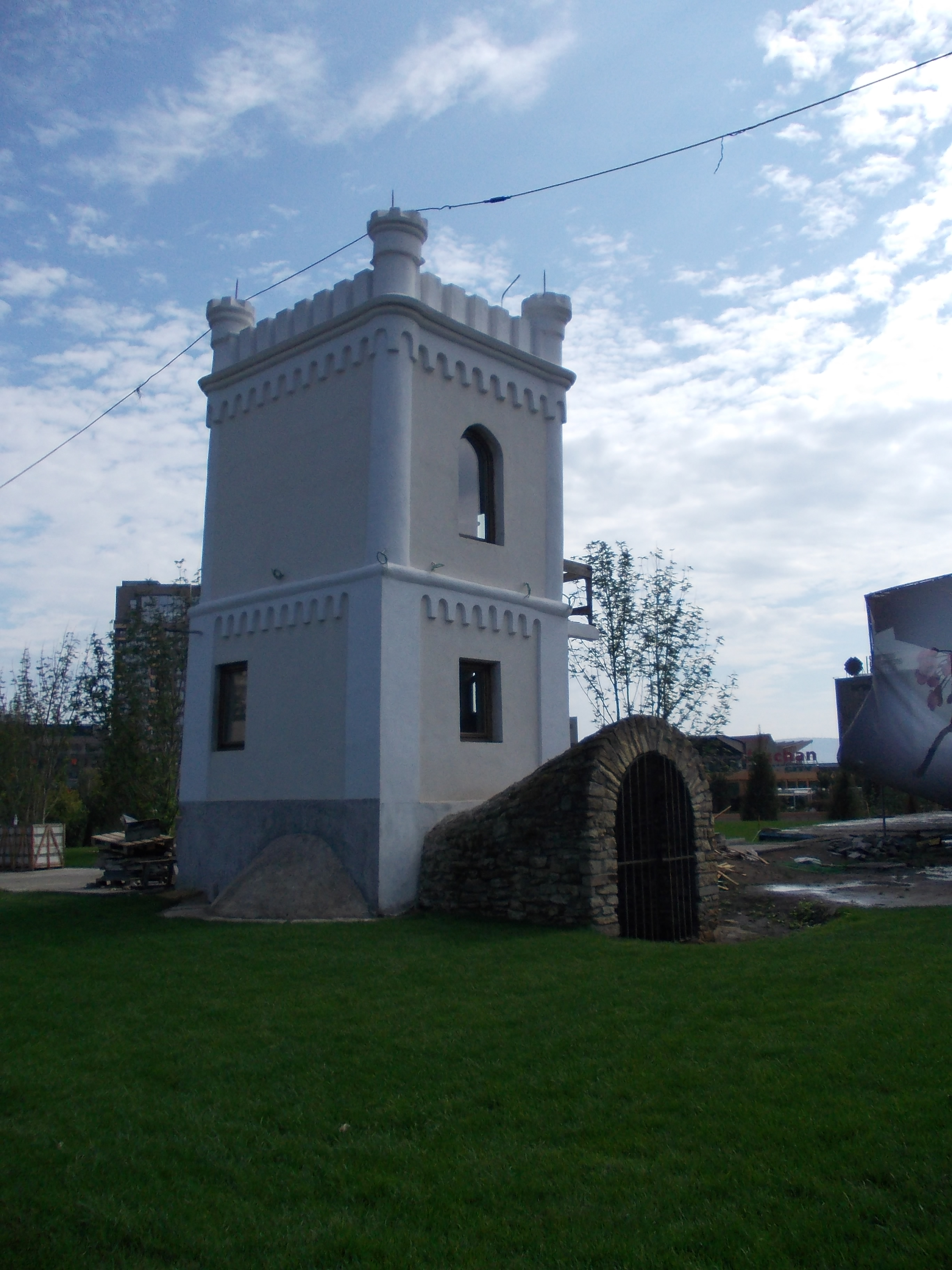 Ruinele Curții domnești 02